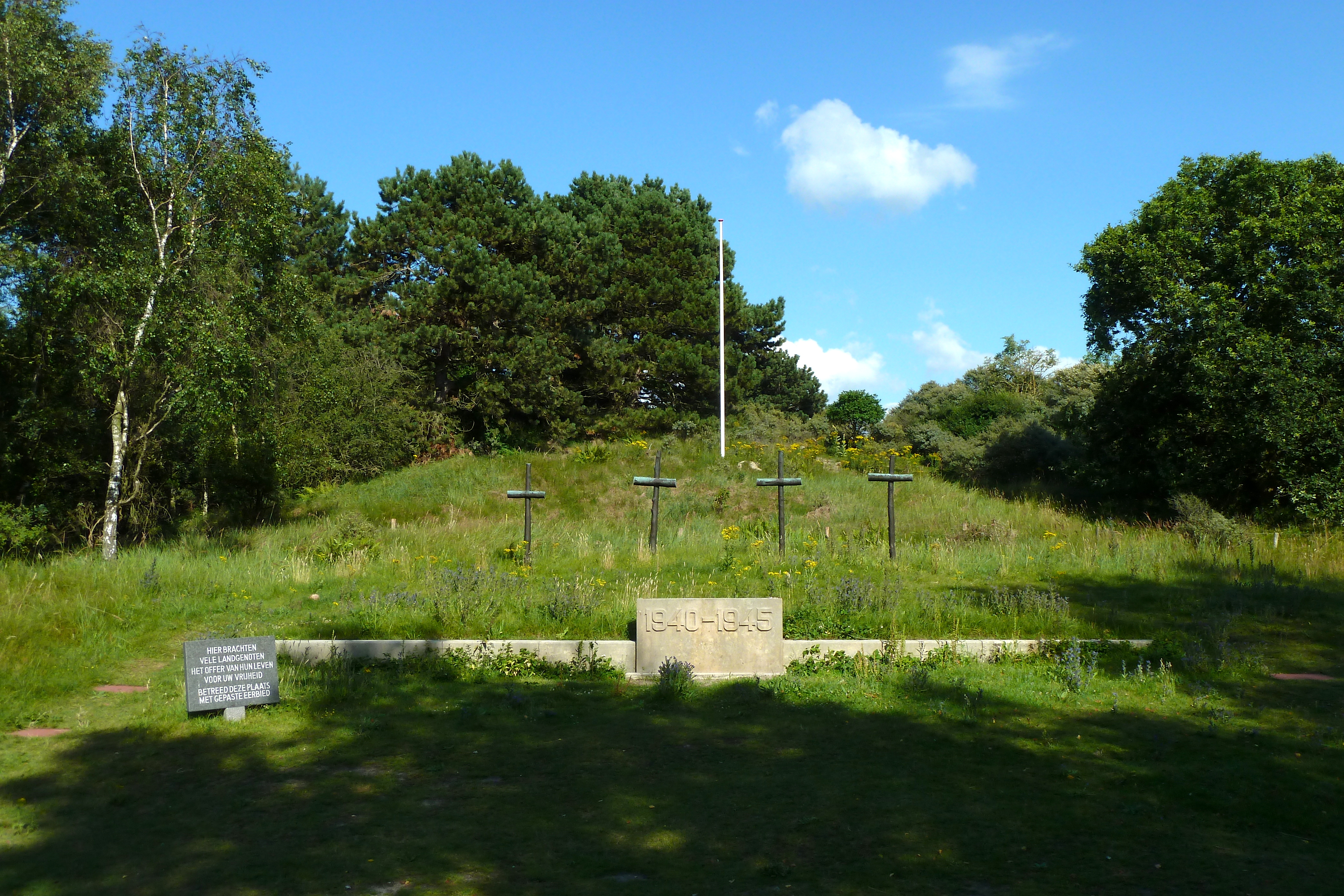 Kruizen op de Gedenkplaats Waalsdorpervlakte